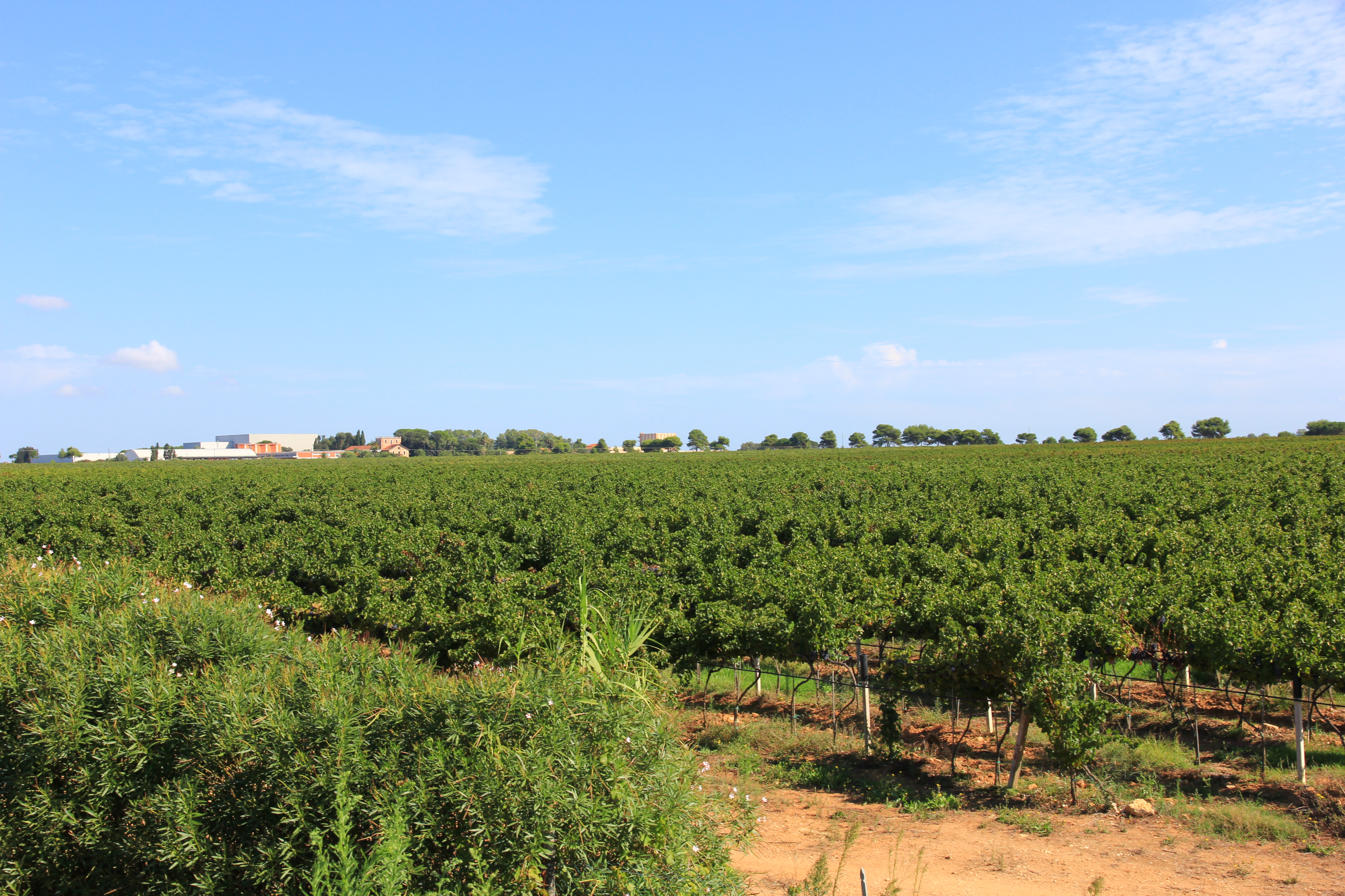 Alghero